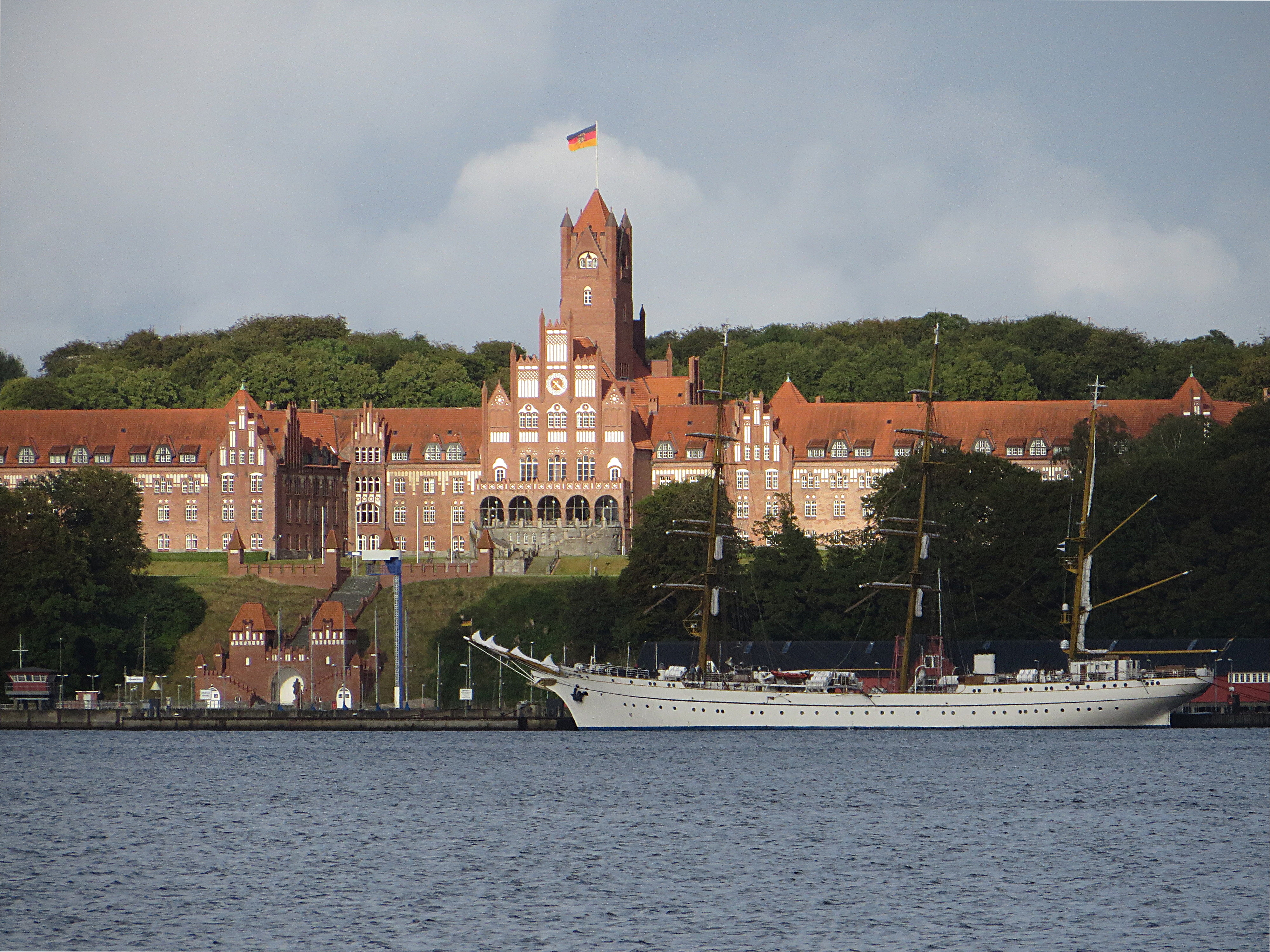 Die Burg mit der präsenten Gorch Fock davor (Flensburg-Mürwik Juli 2015), Bild 02